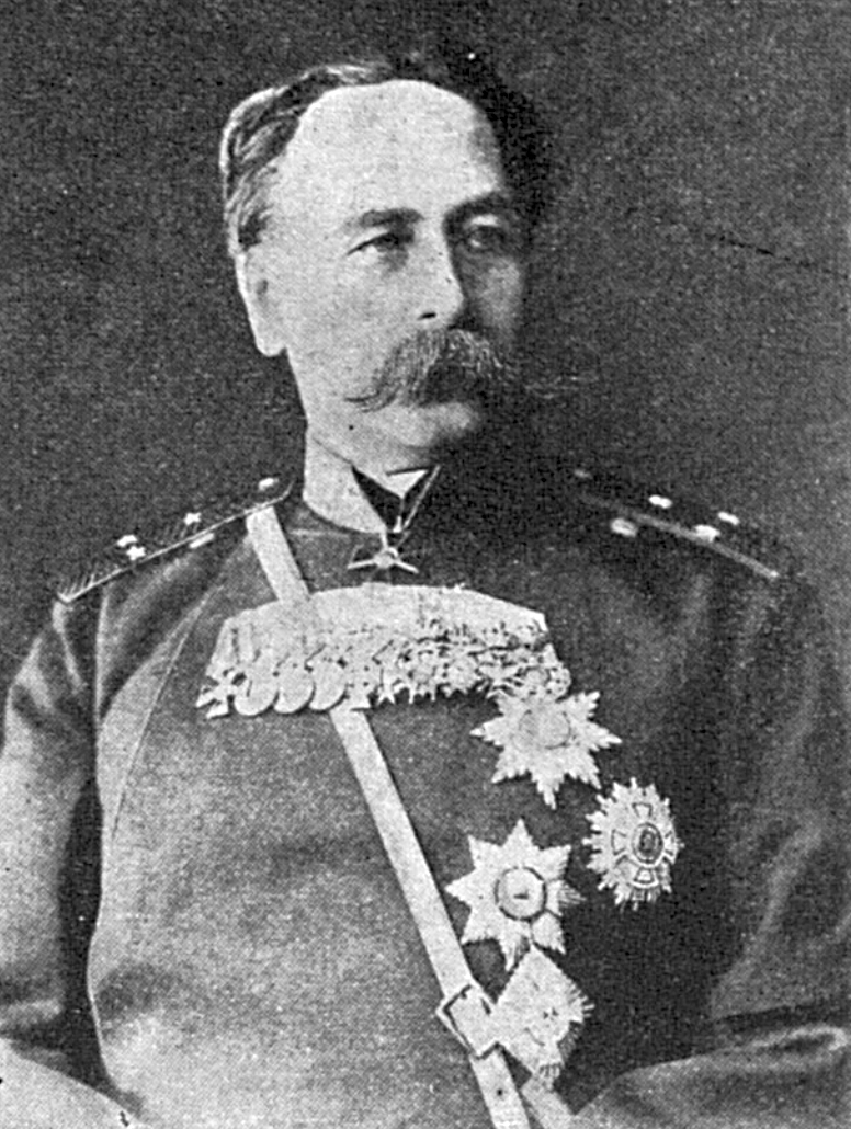 Киреев, Александр Алексеевич